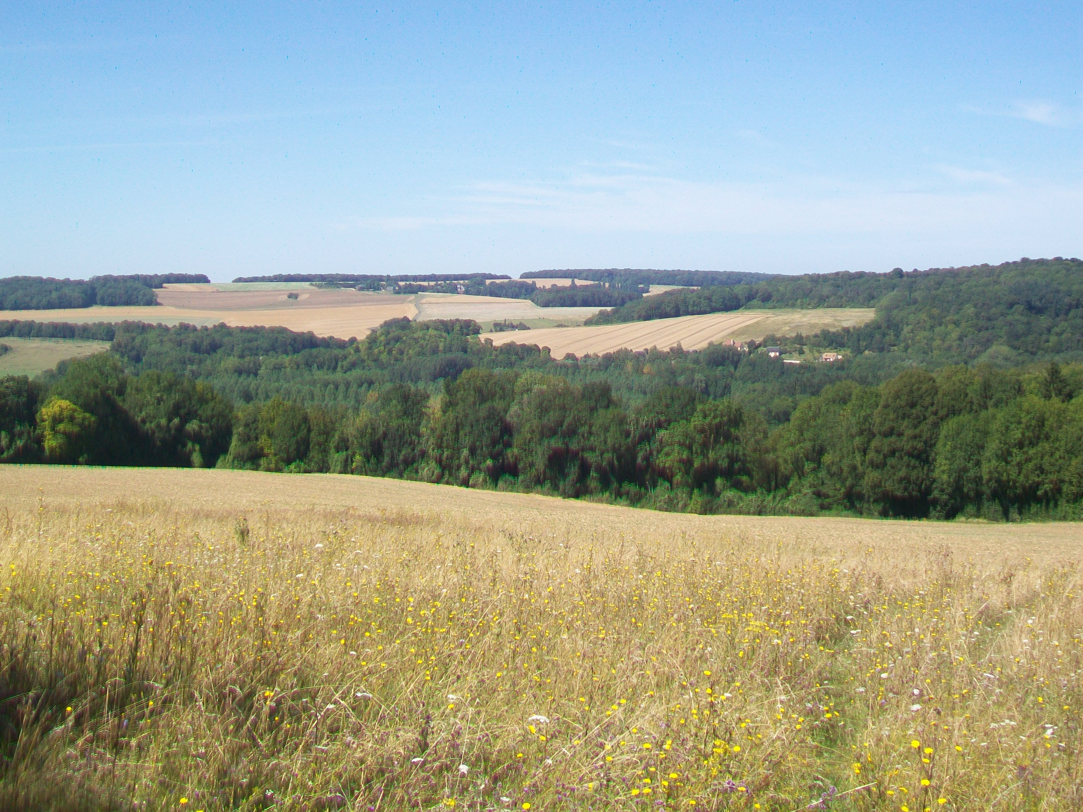 Vue vers la commune de Dampsmesnil (Eure) depuis les hauteurs de Copierre.